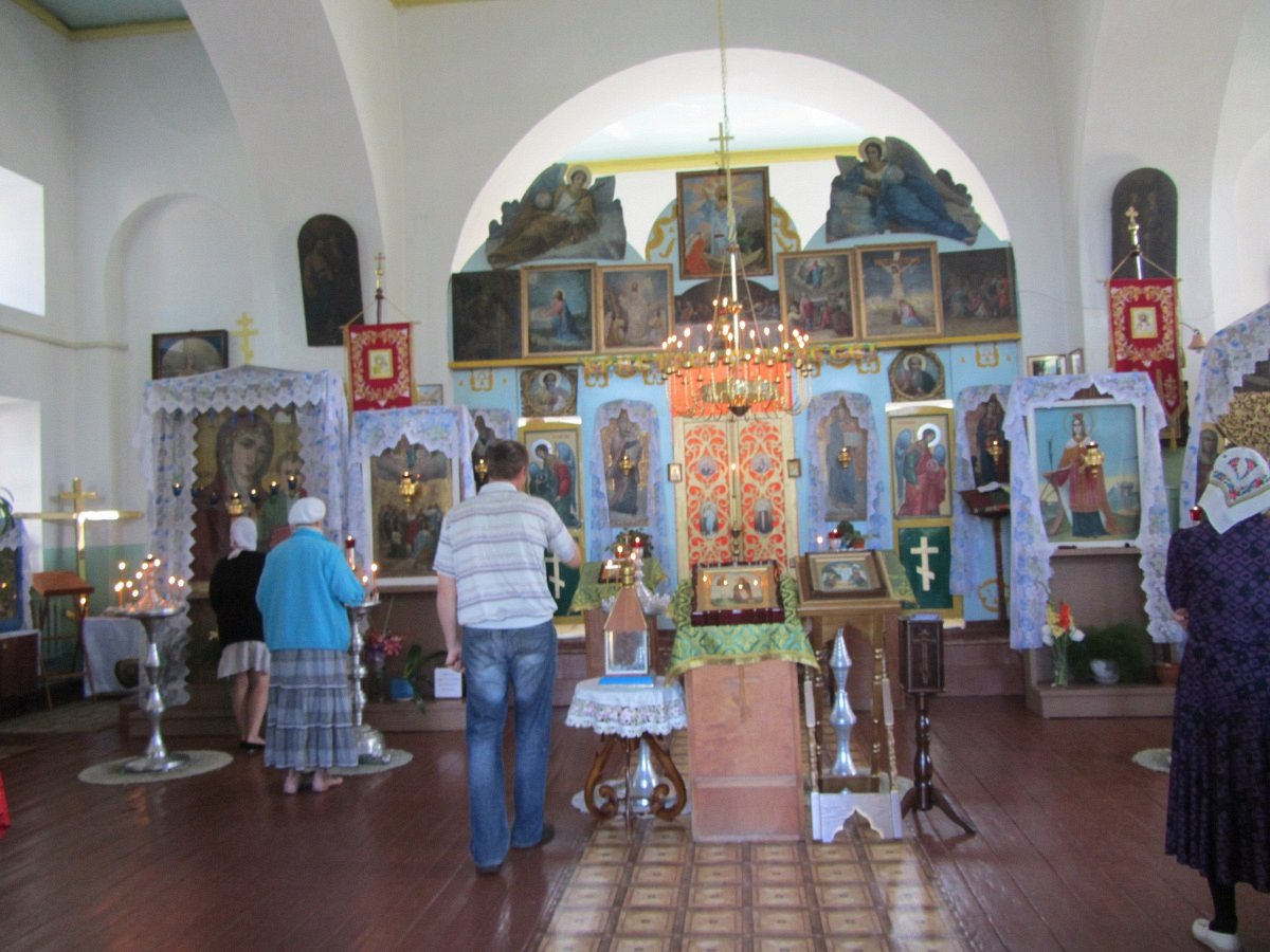 Гадзічава. Свята-Кацярынінская царква